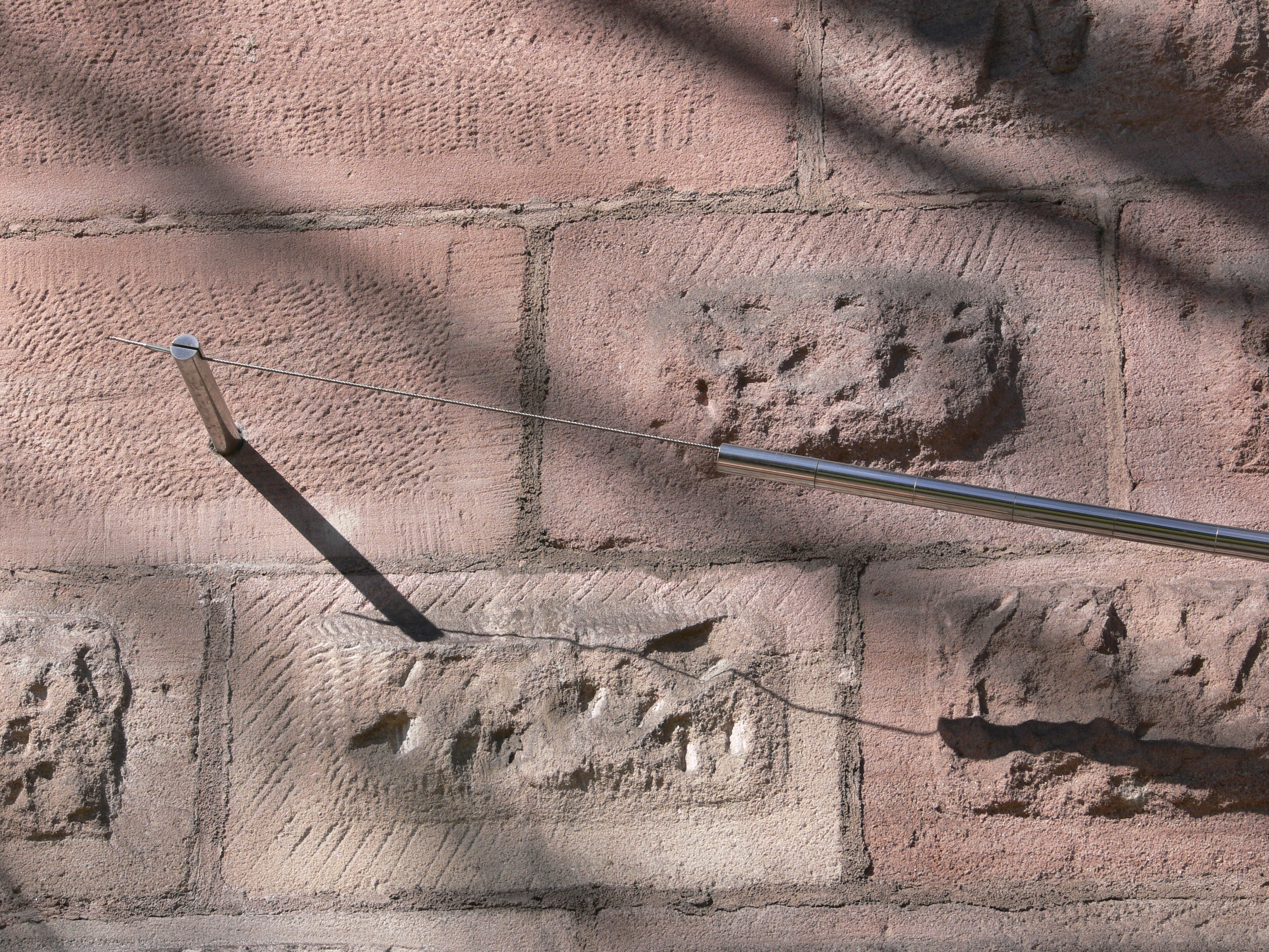 Skulpturengarten Nürnberg im Zwinger des Frauentorgrabens in Nürnberg Alf Schuler (* 1945): Ohne Titel, 2004, Edelstahlrohre auf Stahlseil (Stiftung Marianne und Hansfried Defet, 2004) Detail